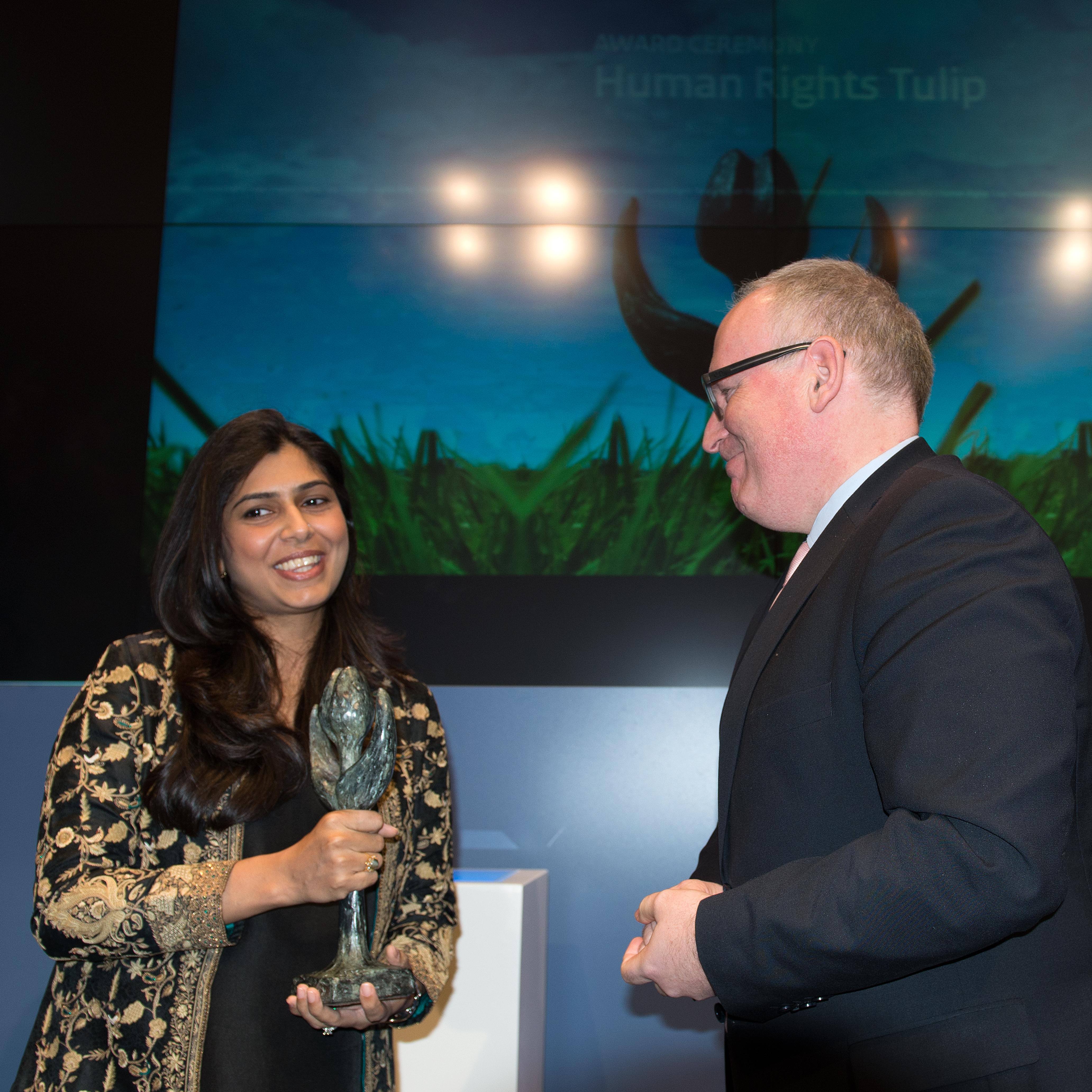 2013 12 11 Mensenrechtentulp Aahung Sheena Hadi 0689